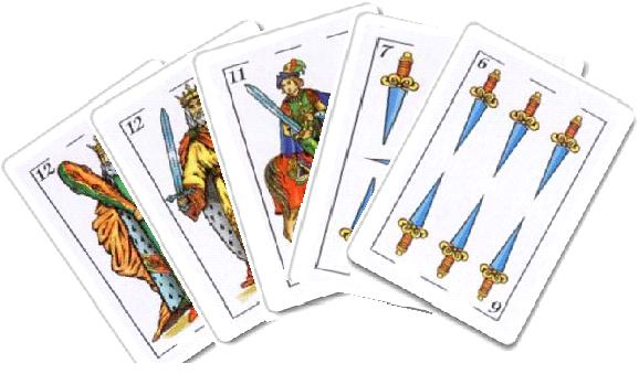 treinta